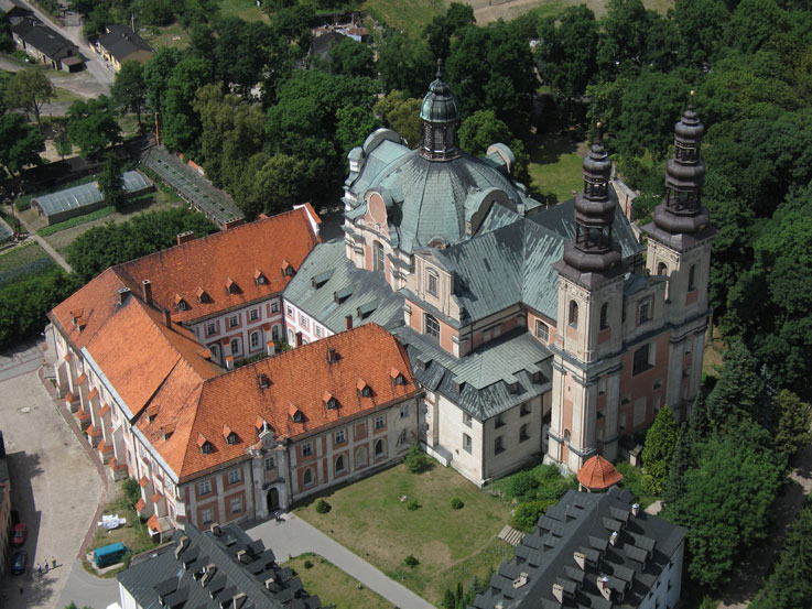 Pocysterskie opactwo w Lądzie.